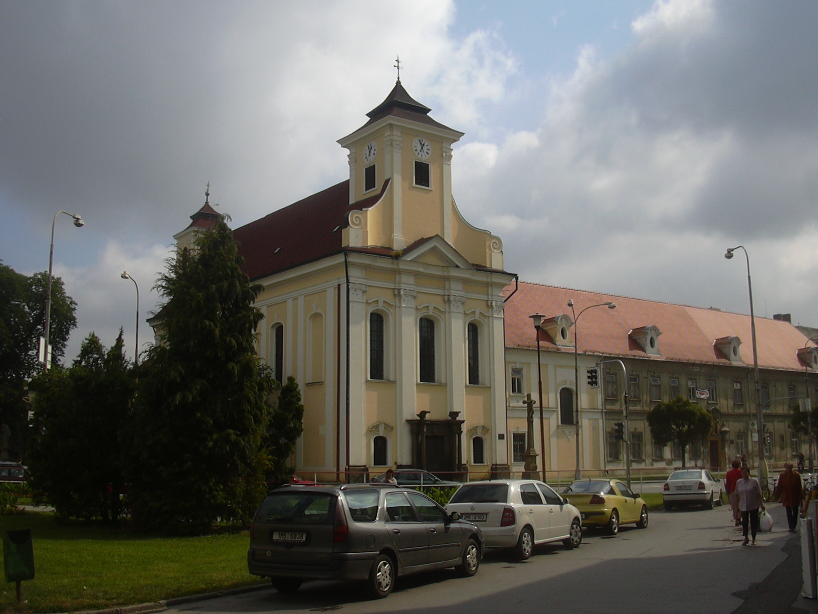 Kostel sv. Jana Nepomuckého u Milosrdných (Prostějov - Czech Republic)